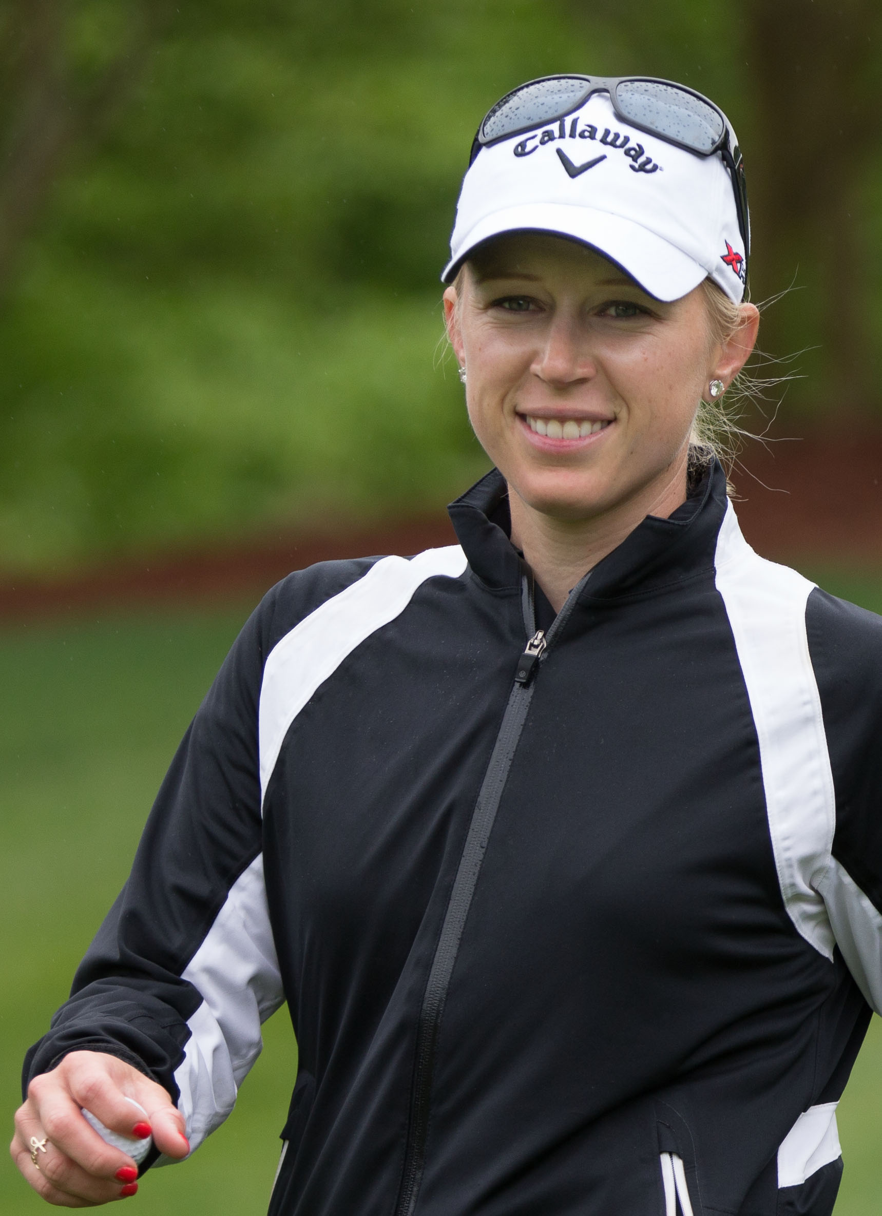 LPGA Kingsmill May 1, 2013